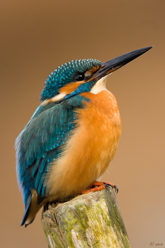 Alcedo atthis, Jakubovské rybníky, Slovakia